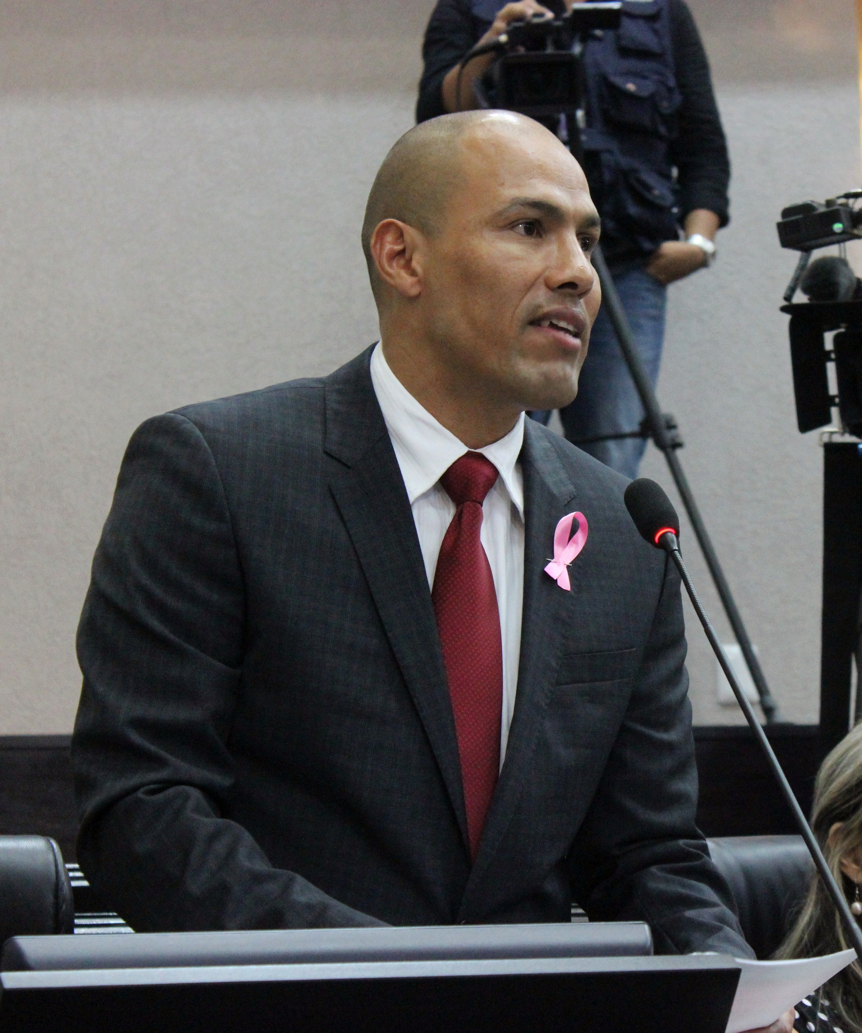 Diputado José Luis Castillo Godínez en Sesión de Pleno del Congreso del Estado de Sonora, el martes 06 de octubre de 2015.